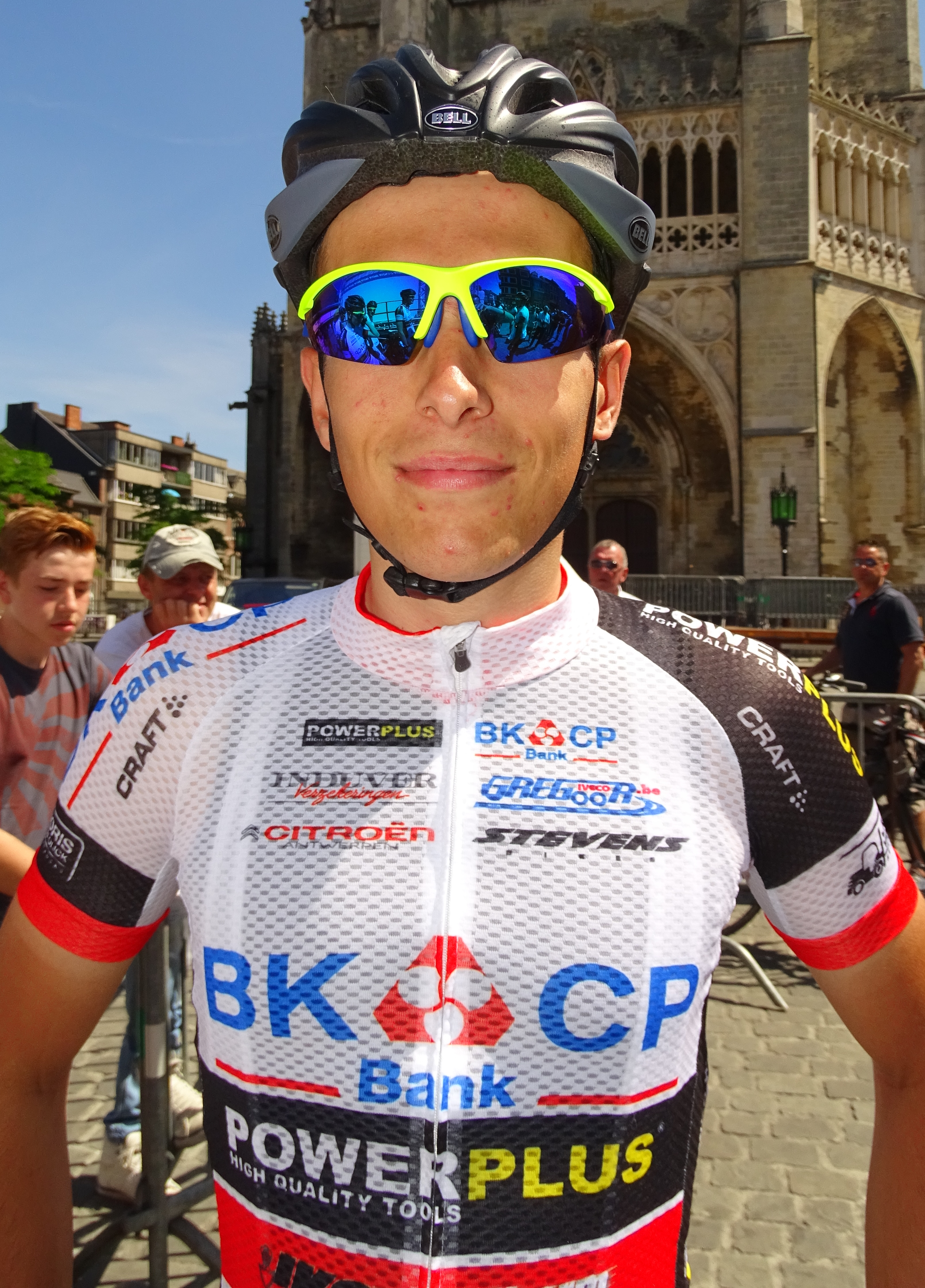 Reportage réalisé le dimanche 14 juin à l'occasion du départ et de l'arrivée du Tour du Limbourg 2015 à Tongres, Belgique.